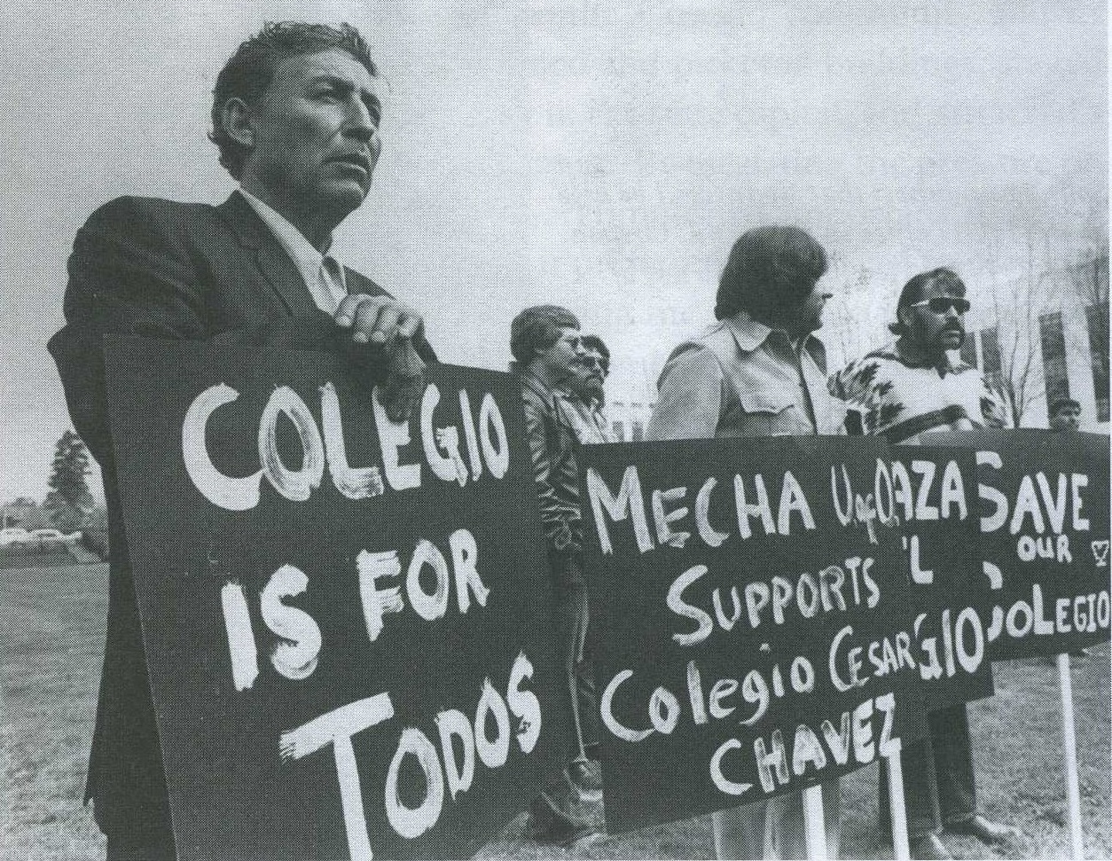 Manifestacion para el colegio.